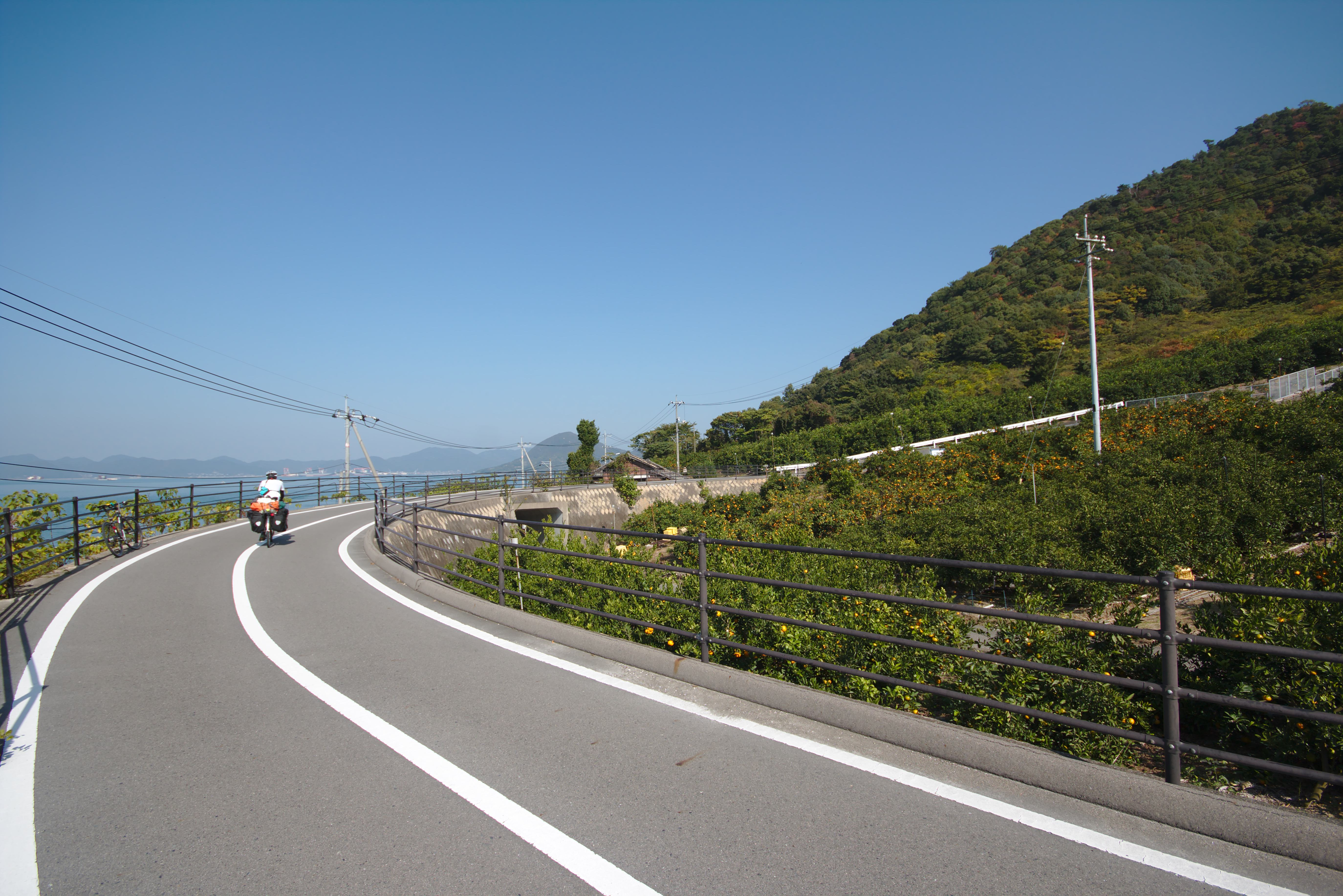 Montée vers le pont de Tatara, sur la piste cyclable de Shimanami Kaidō, île d'Ikuchijima, Japon